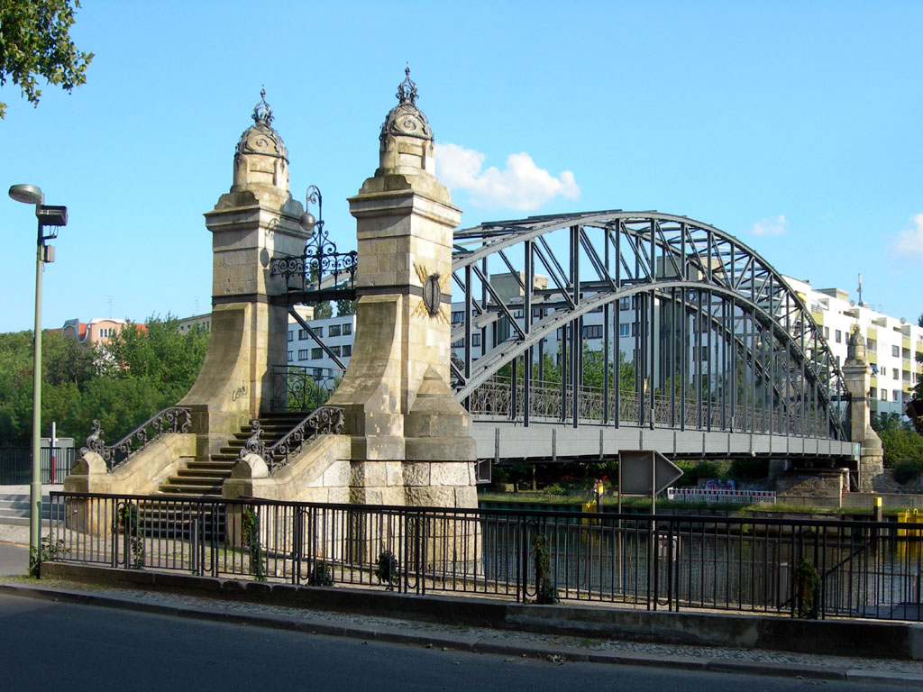 Siemenssteg in Berlin-Charlottenburg